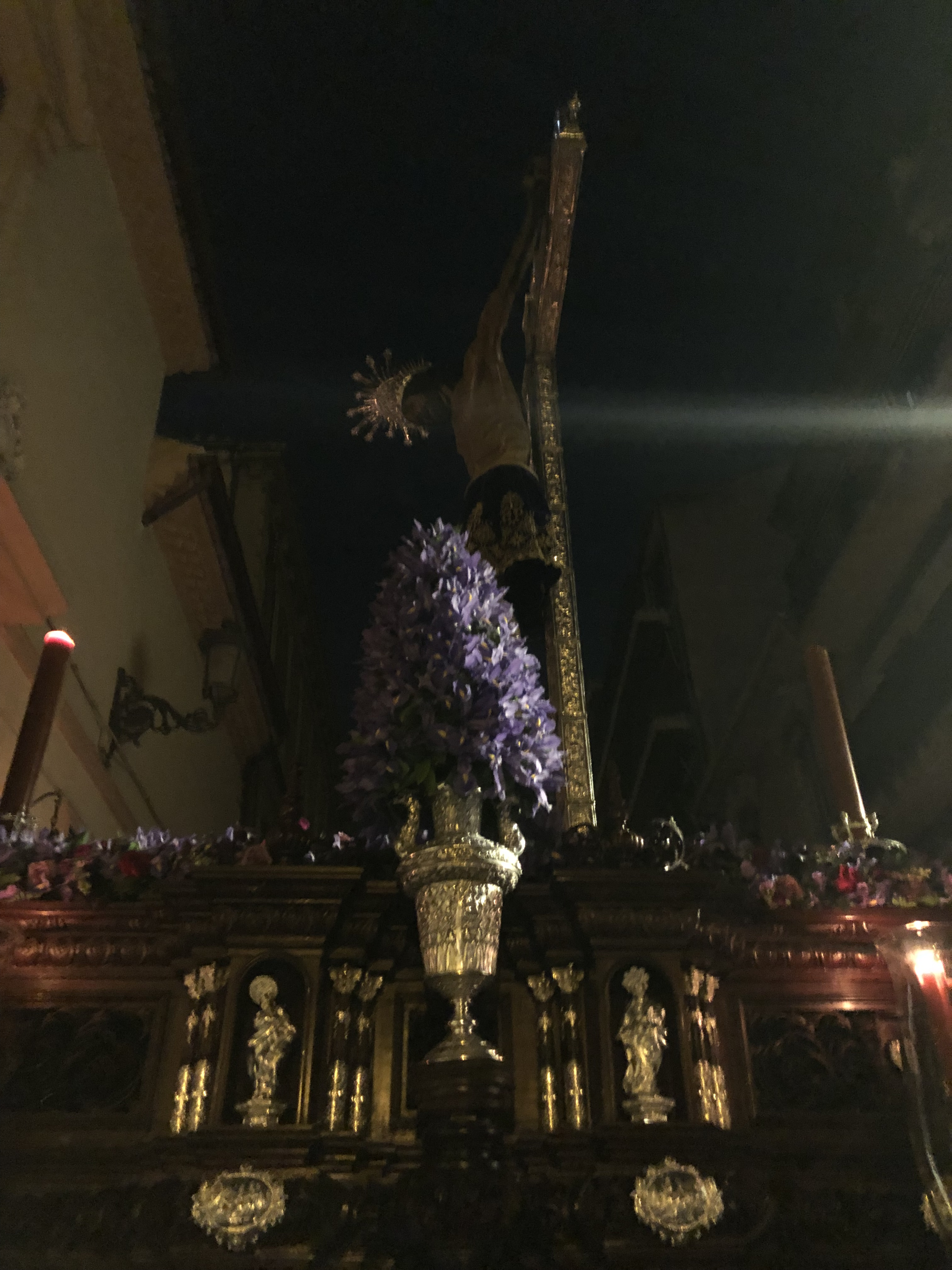 San Agustín